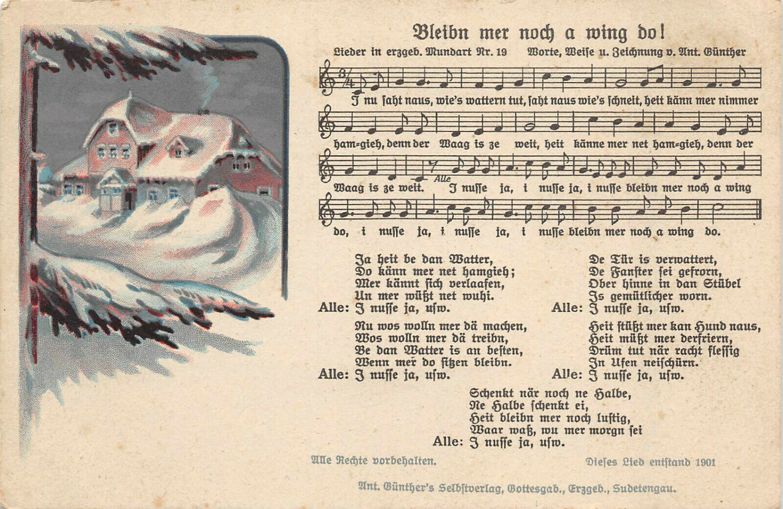 Liedpostkarte von Anton Günther Nr. 19 "Bleibn mer noch a wing do!"